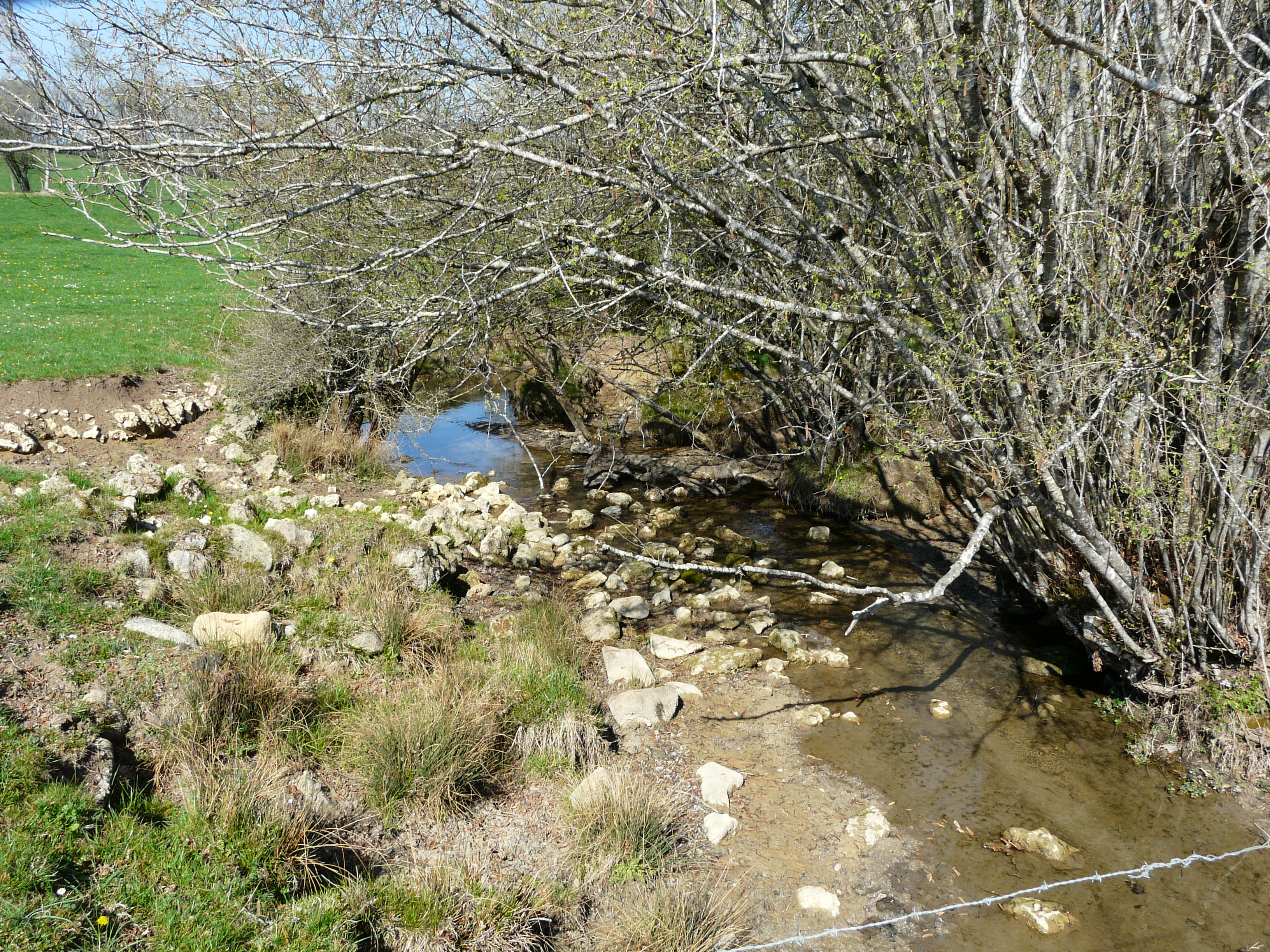 Le bras inférieur du Boulou aux Brageaux, Saint-Crépin-de-Richemont, Dordogne, France. Vue prise en direction de l'amont.